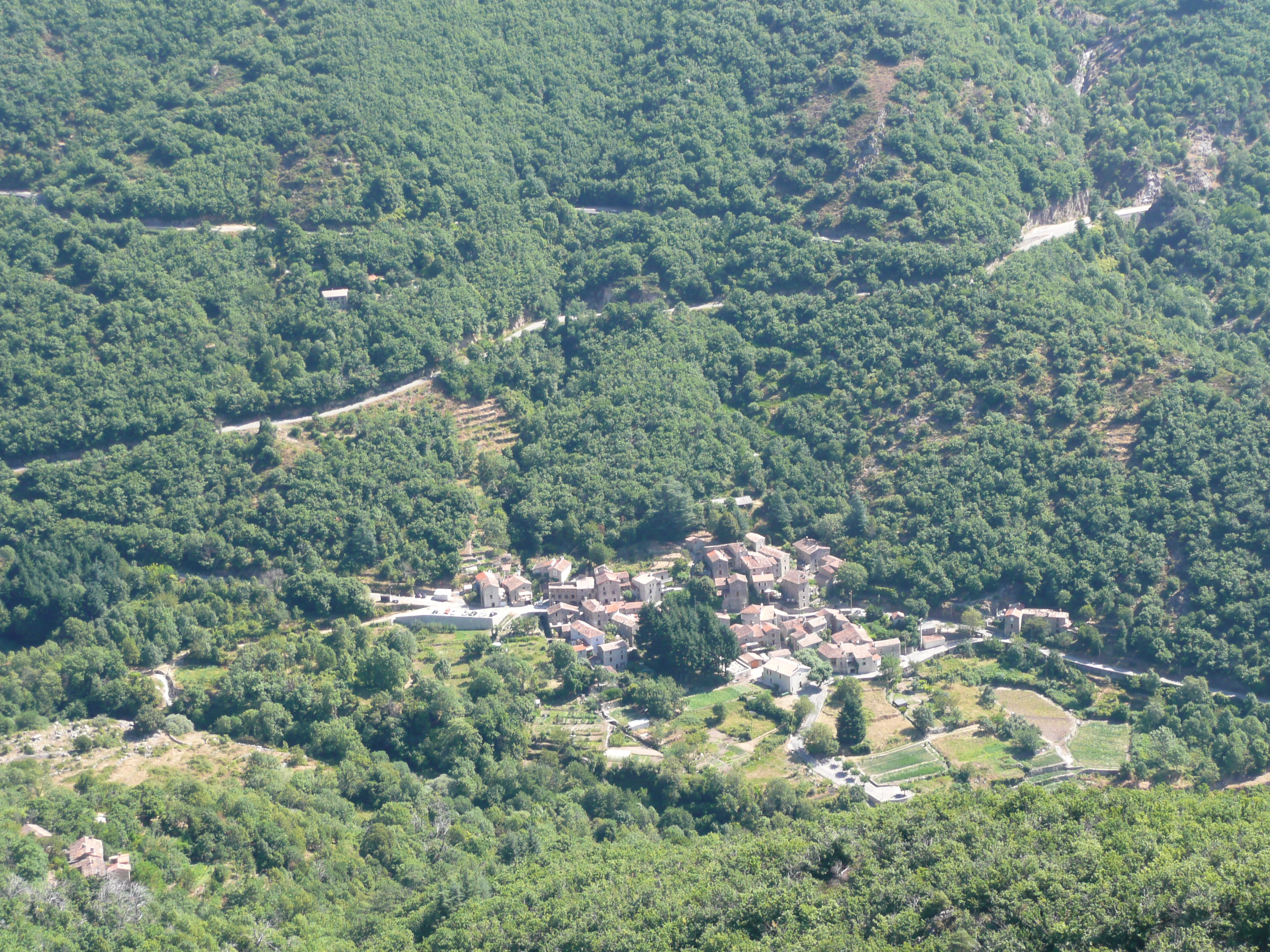 Village de Arphy dans le Gard vu depuis la D48